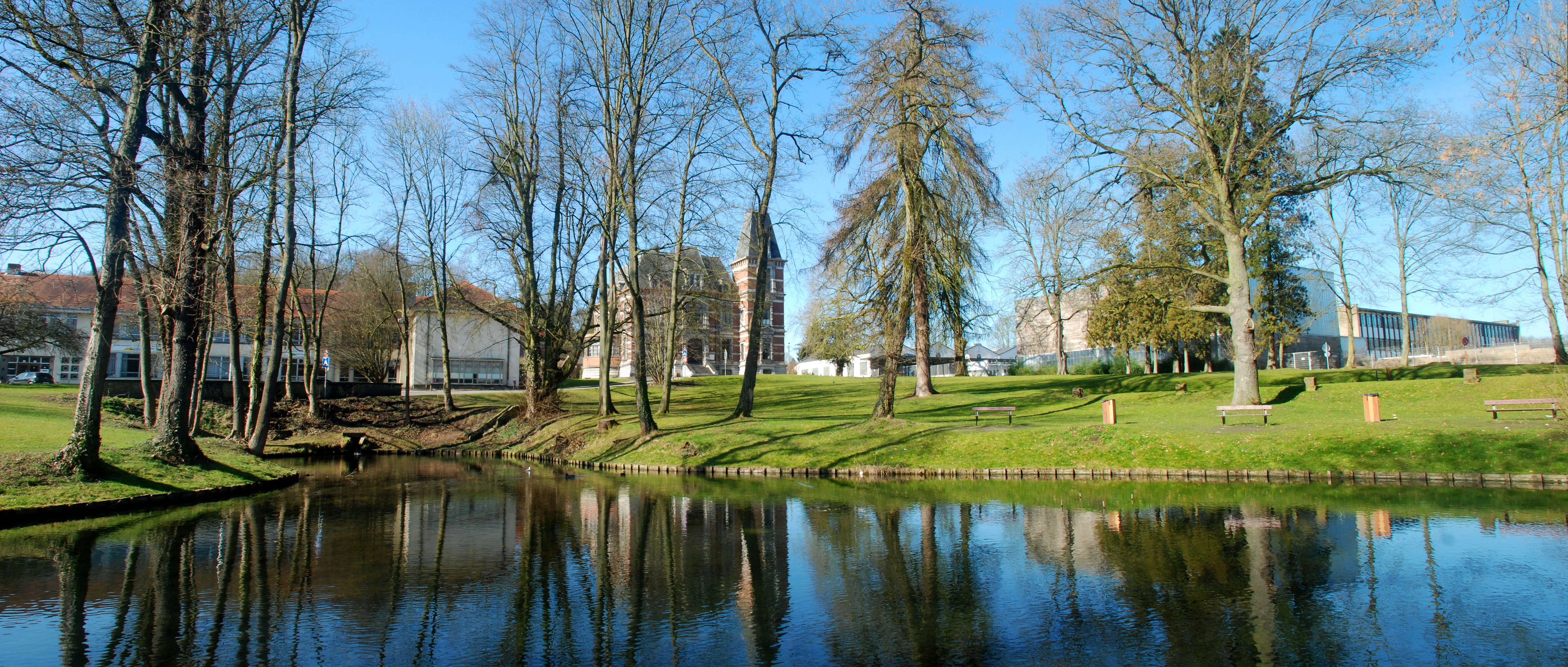 Belgique - Brabant wallon - Court-Saint-Étienne - Parc de Wisterzée